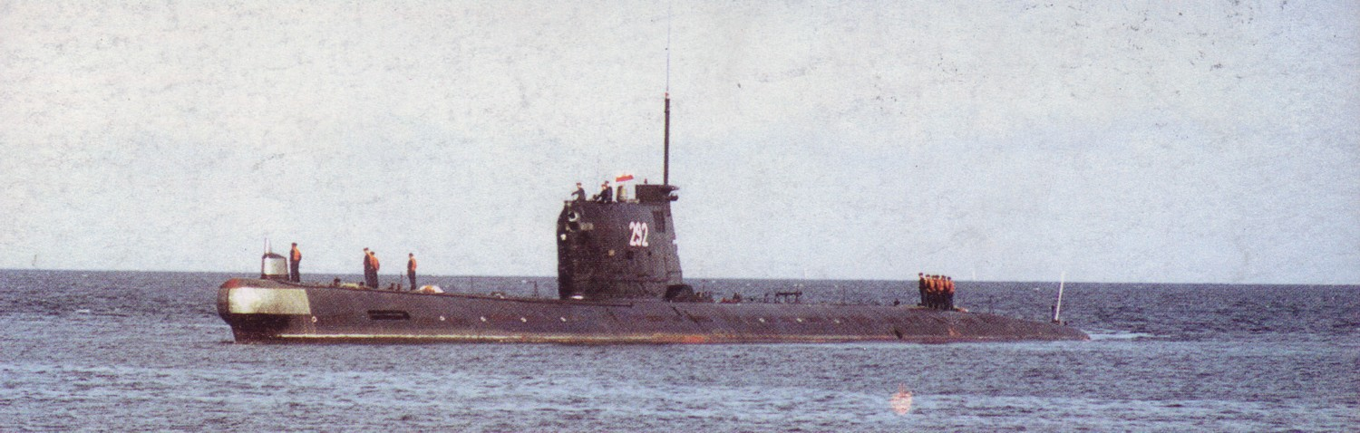 ORP Wilk